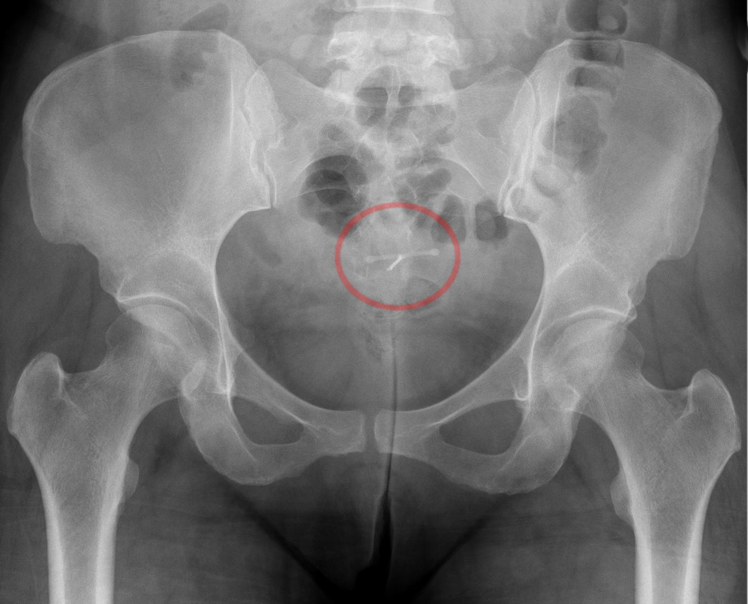 Spirale Mirena im Röntgenbild. Das intrauterine Device enthält zur Röntgenmarkierung Barium-Sulfat.